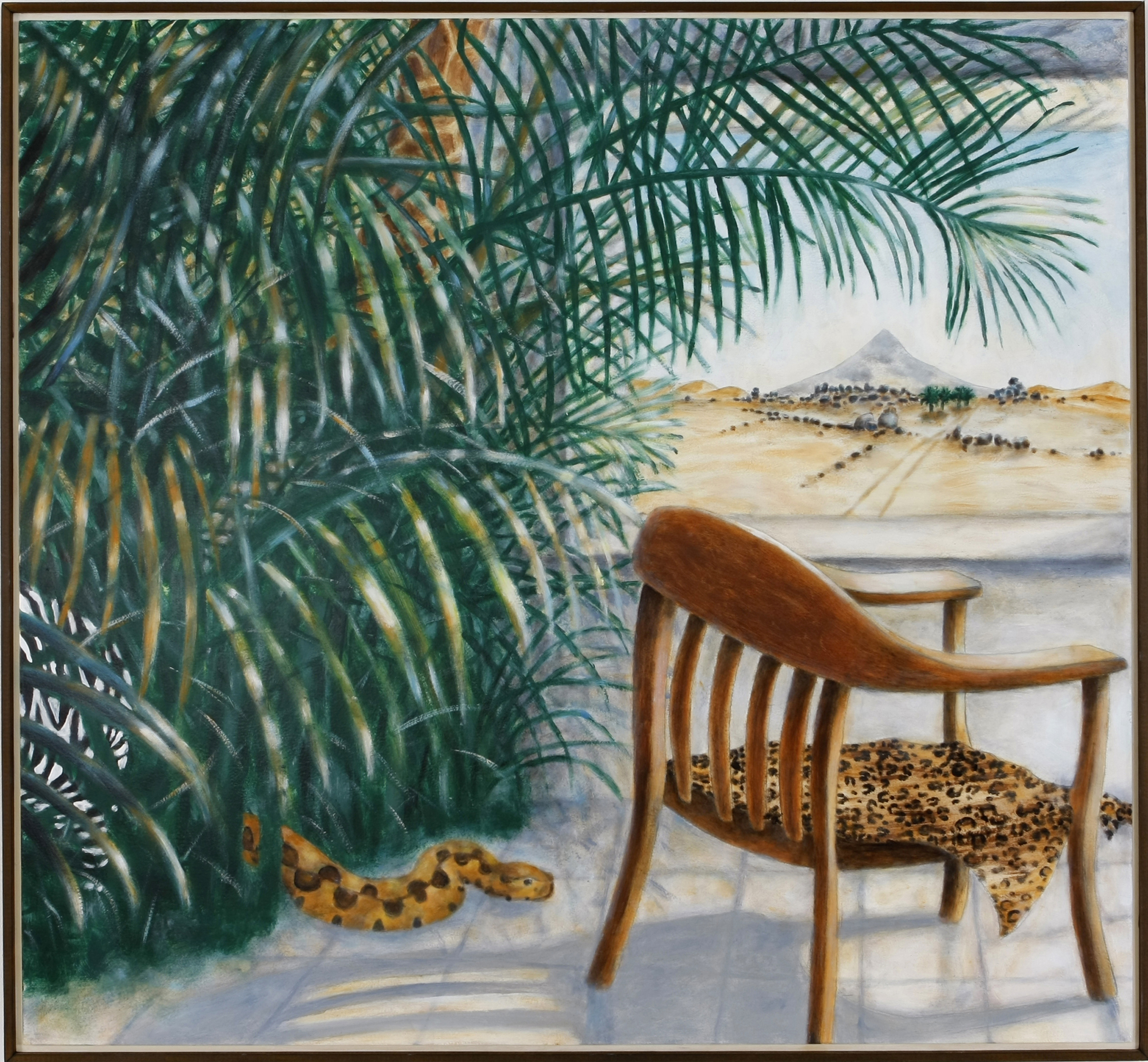 Ich habe ein Haus in Afrika, 2009, Öl auf Holz